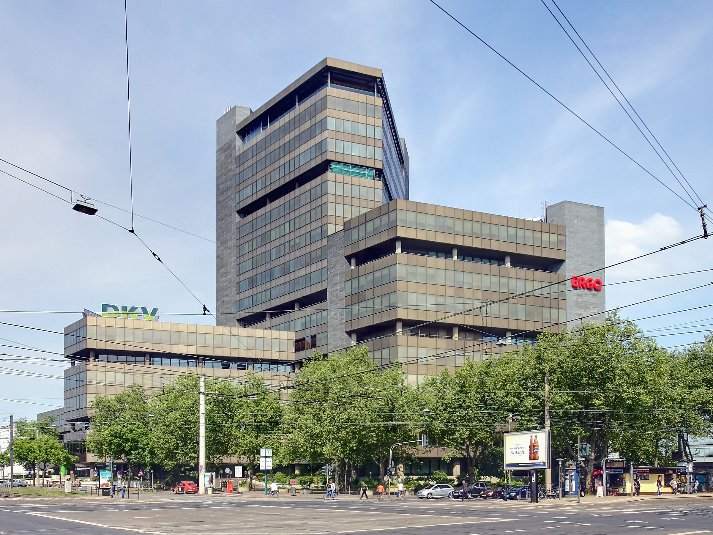 Hauptverwaltung der DKV Deutsche Krankenversicherung AG, Ecke Aachener Straße/Gürtel, Köln